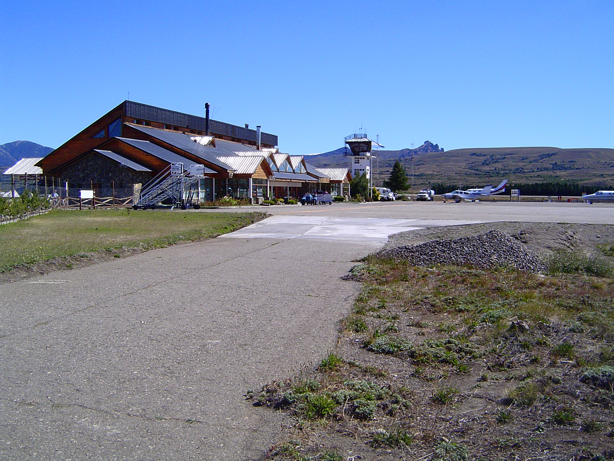 Aeropuerto Aviador Carlos Campos. Pcia. de Neuquén. Fotografía del 18 de marzo de 2006.